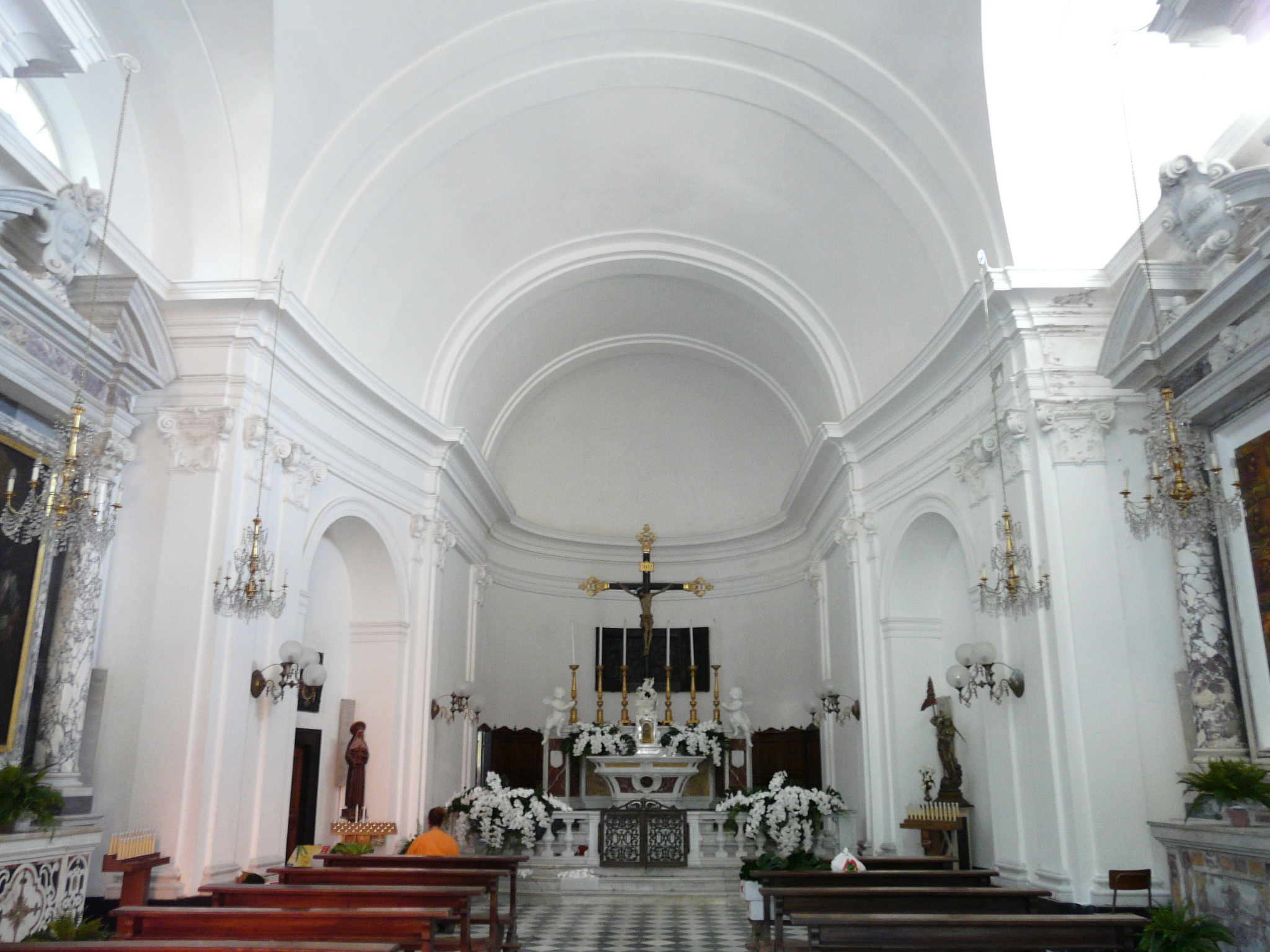 Navata della chiesa di San Giorgio, Portofino, Liguria, Italia